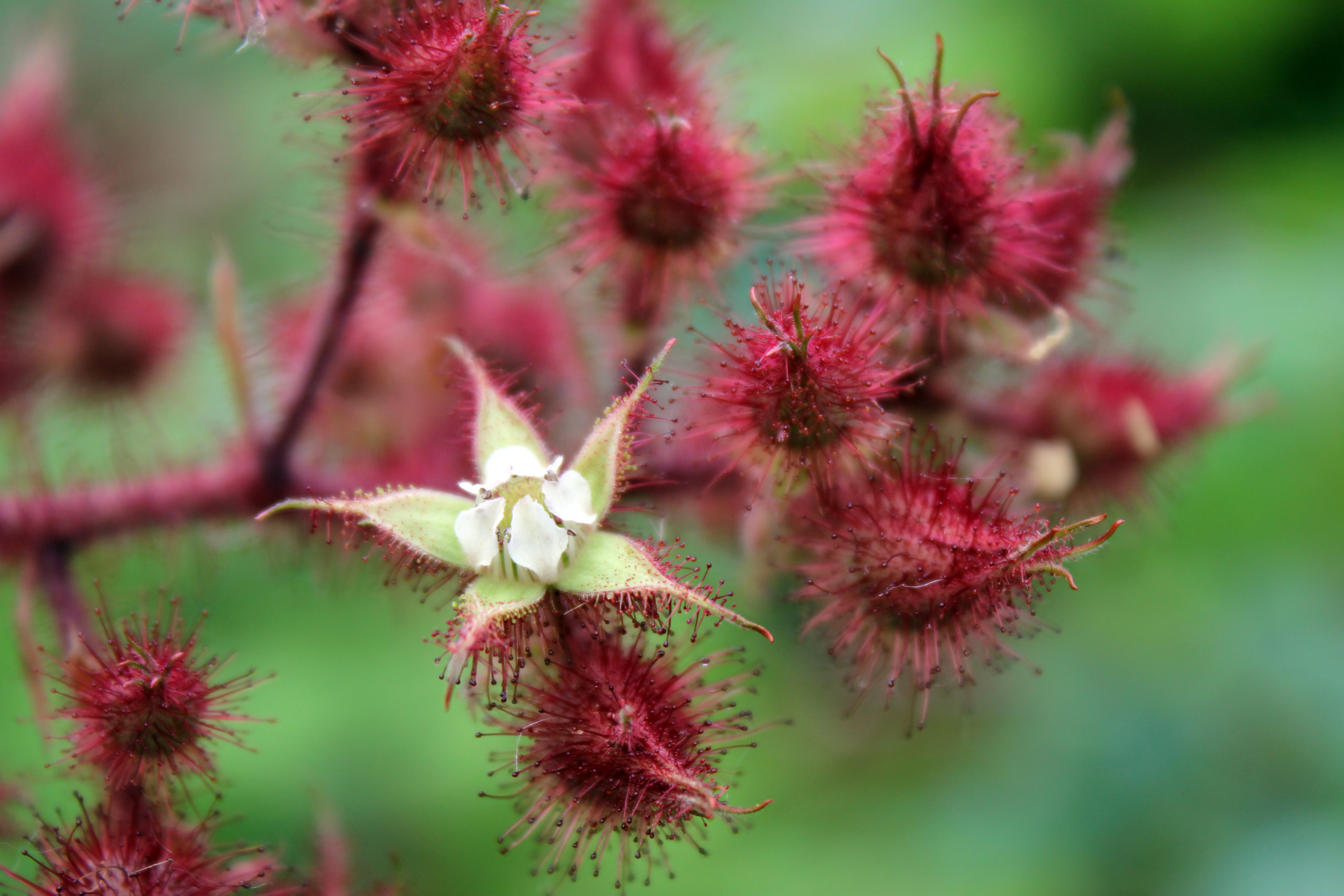 Japanische Weinbeere (Rubus phoenicolasius), Blütenknospen und geöffnete Blüte